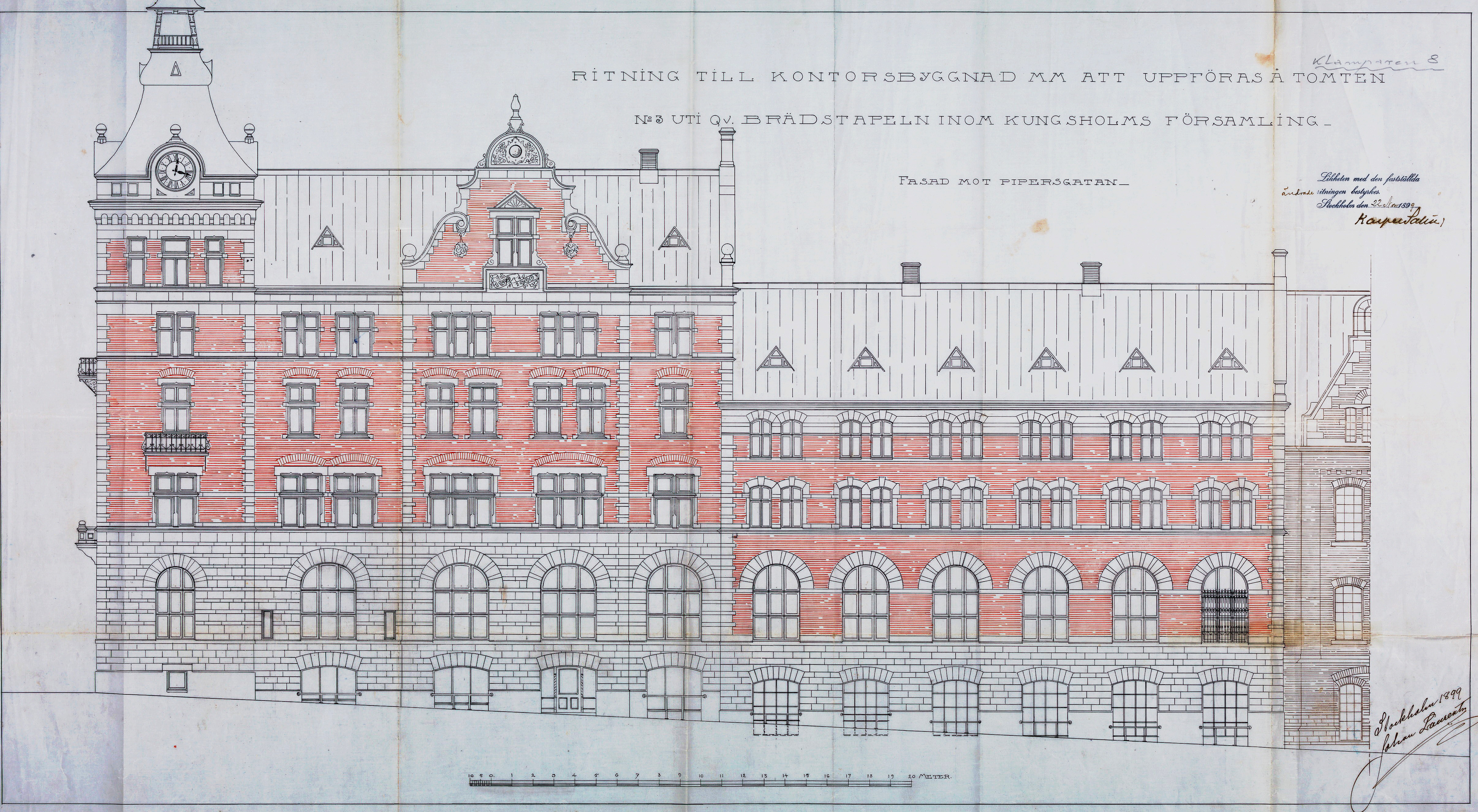 AB Separators kontorsbyggnad, fasadritning